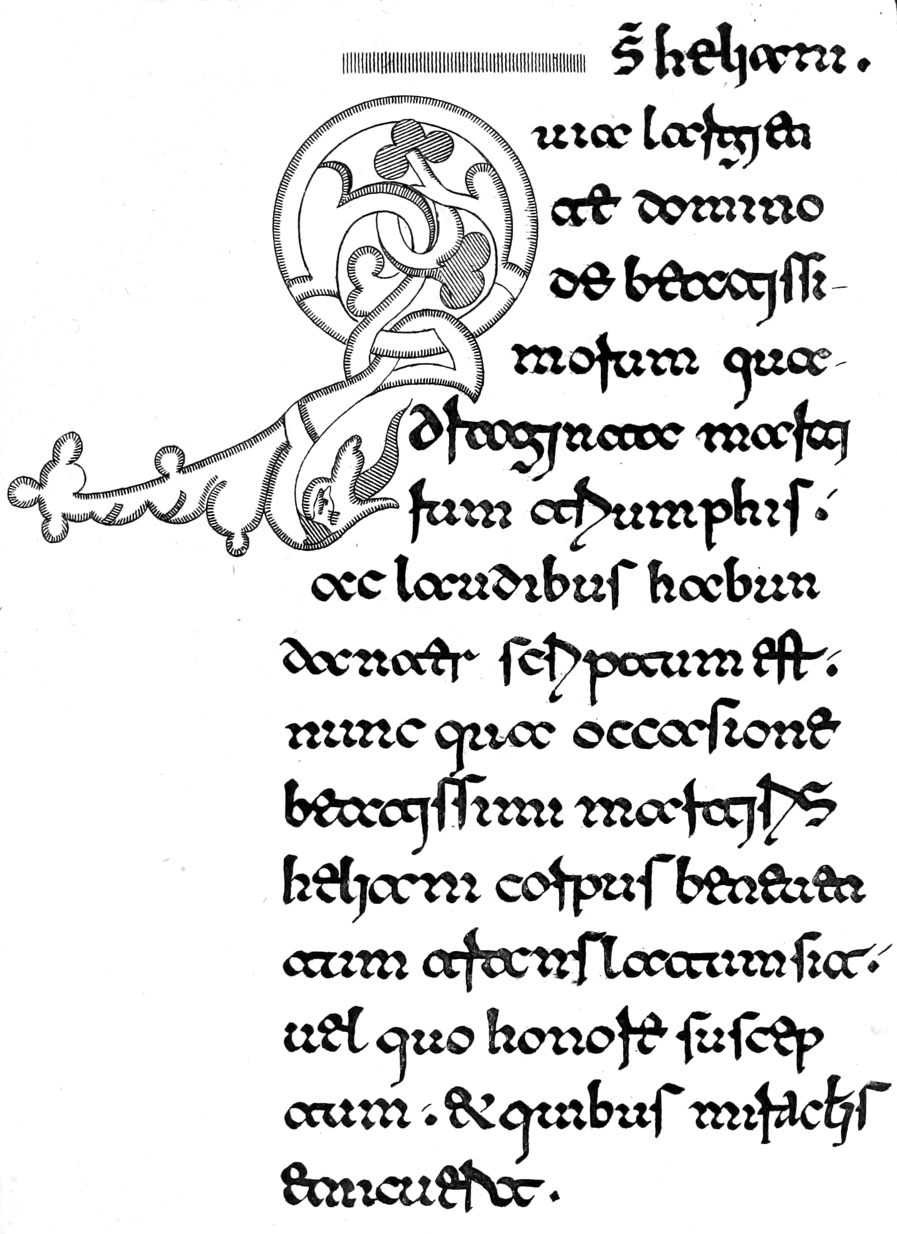 Inizio del racconto della Translatio Sancti Heliani da un manoscritto del XII secolo, riportato in Stefano Borgia, Memorie istoriche della pontificia città di Benevento, I, Roma, Salomoni, 1763.